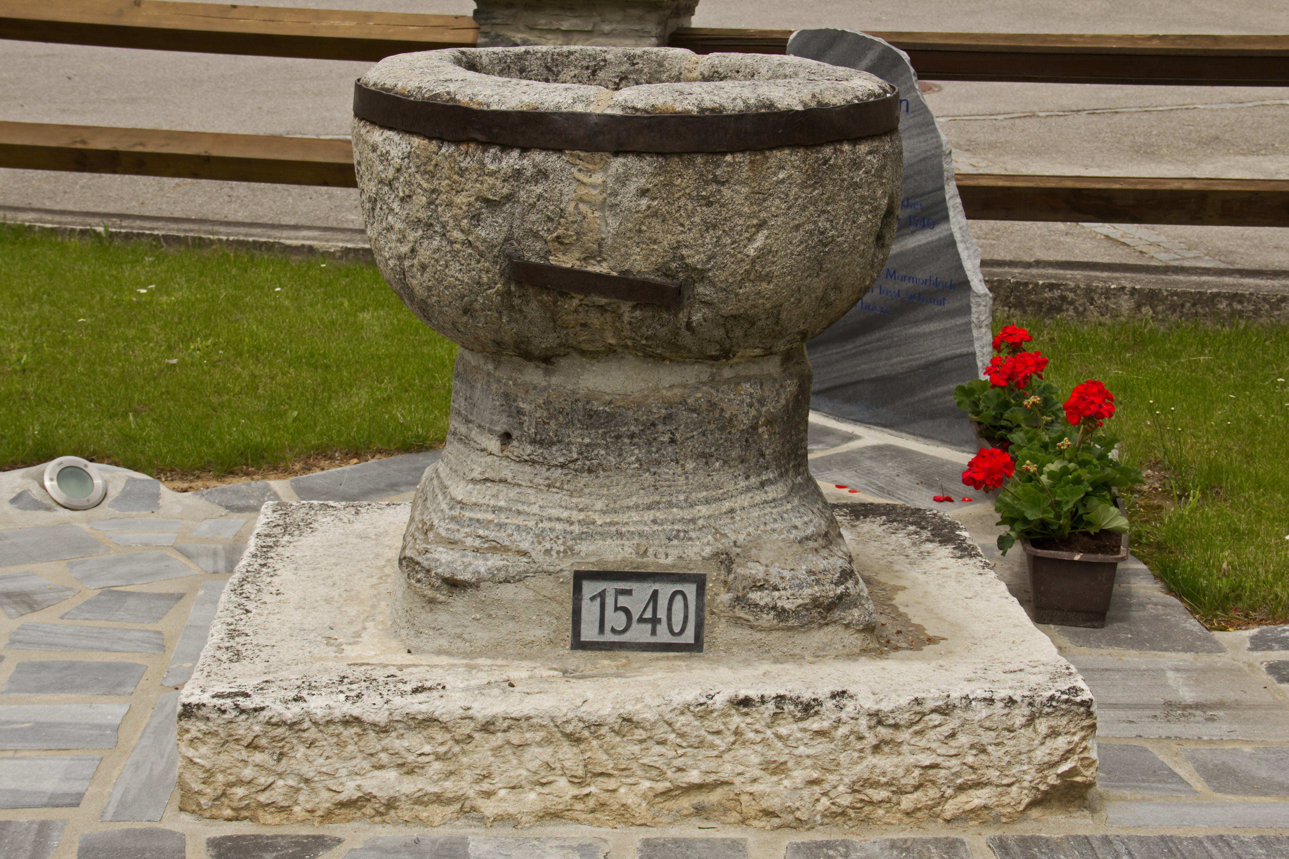 Kornmetzen am Marktplatz, nachträglich mit 1540 bezeichnet.